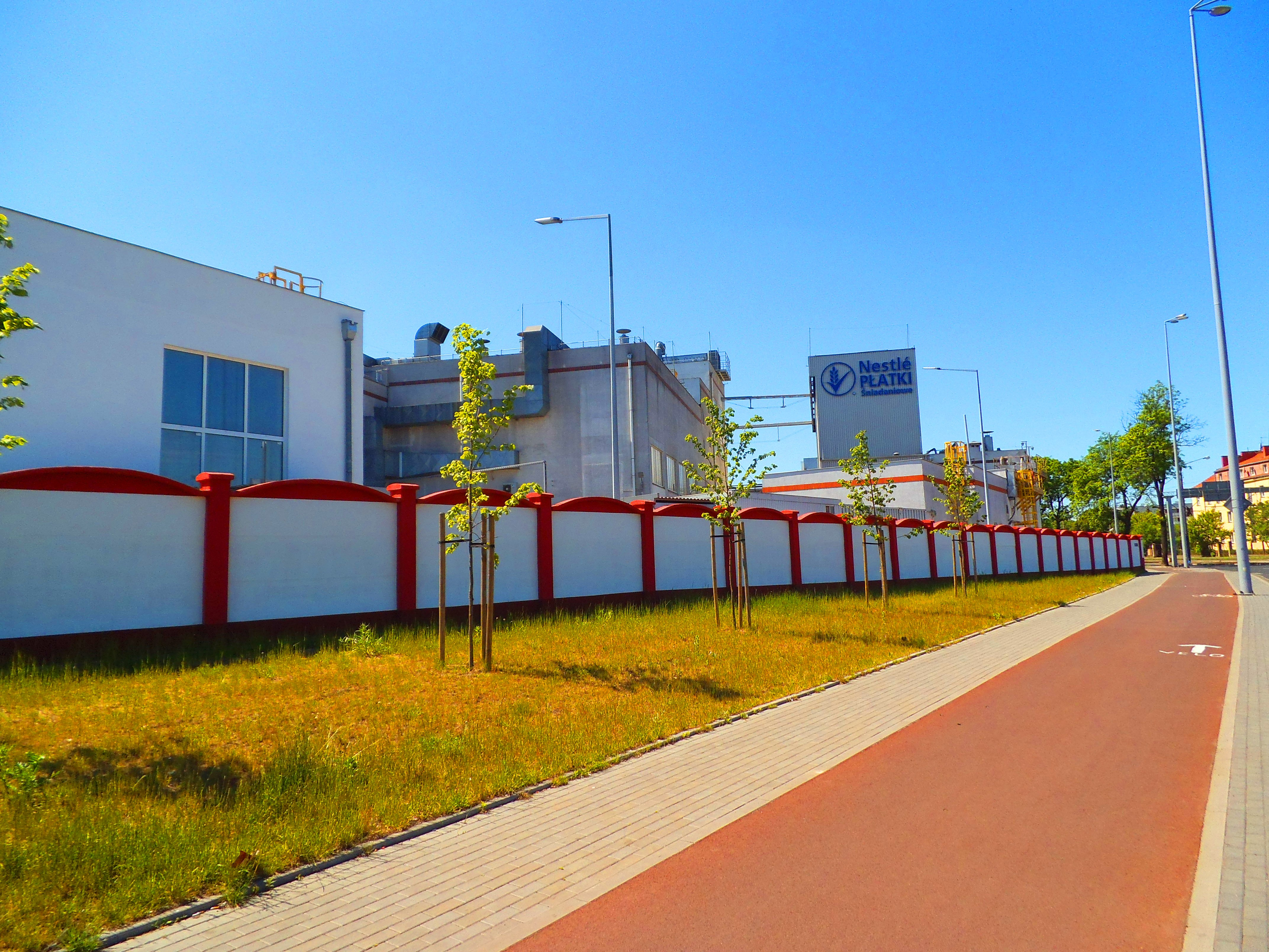 Ścieżka rowerowa przy ul. Szosa Lubicka w Toruniu